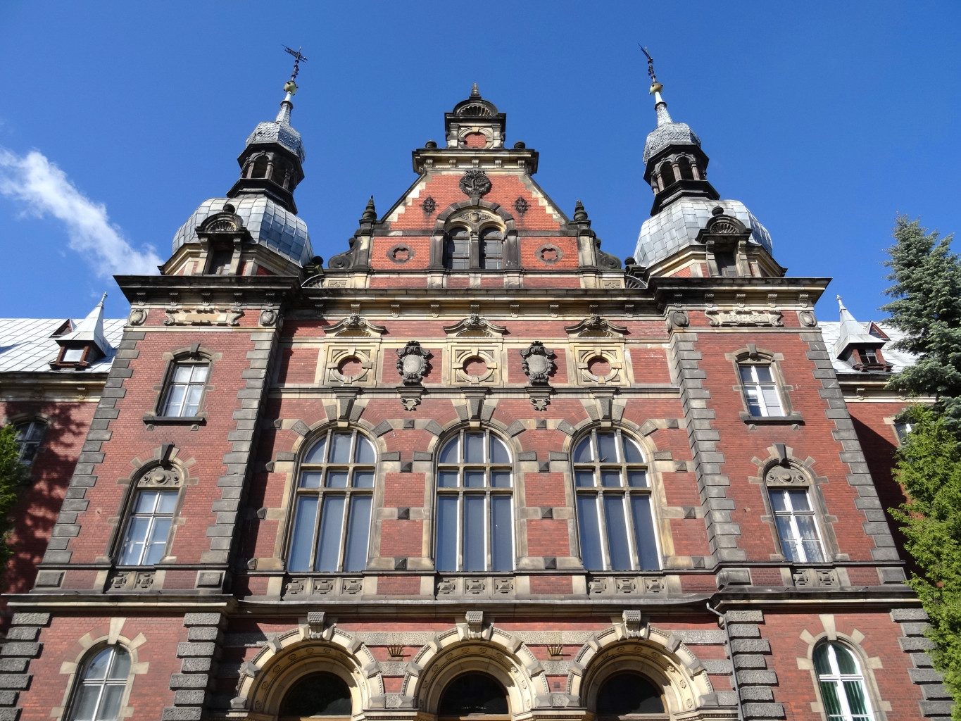 Budynek dawnej Dyrekcji Kolei w Bydgoszczy, ul. Dworcowa 63